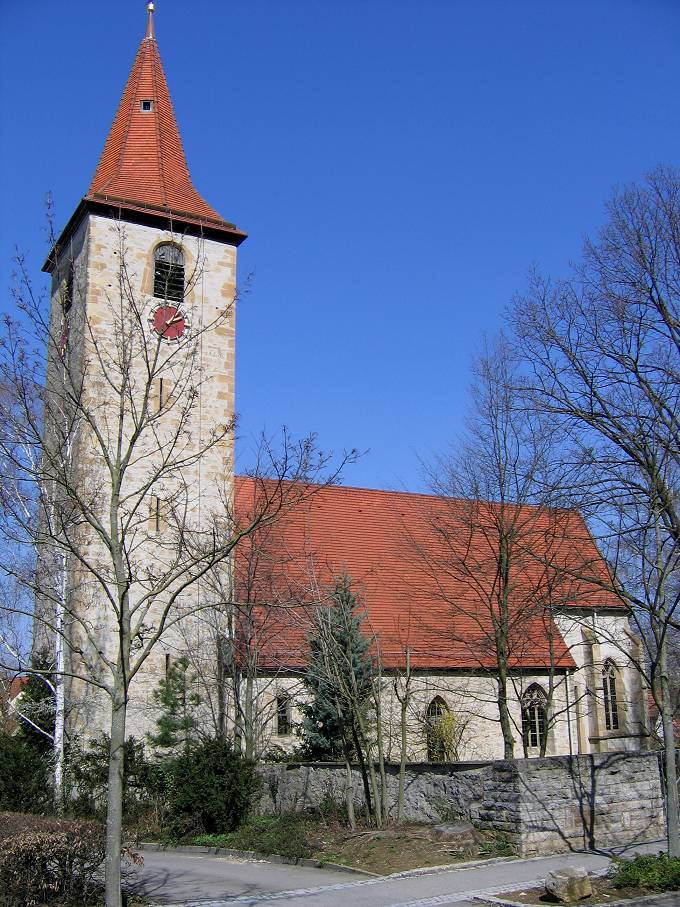 Gotische Pankratiuskirche in Möglingen